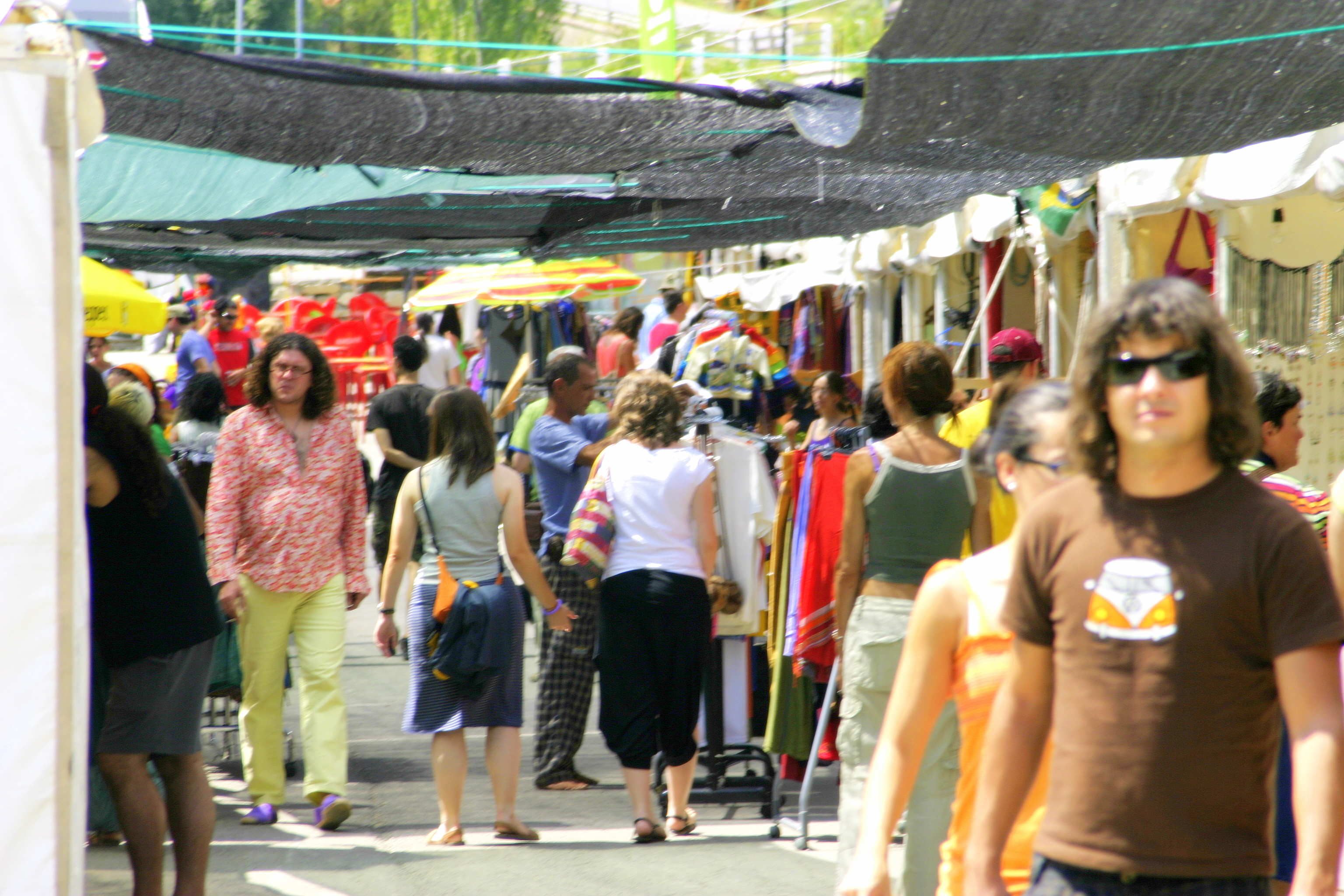 Sallent de Gállego, Pirineos Sur